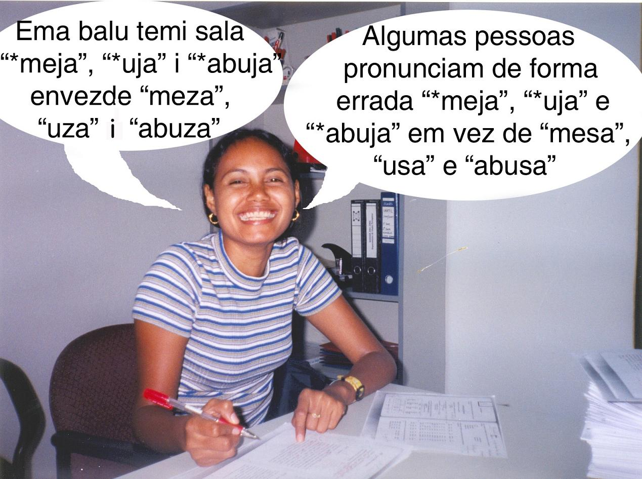 Photo & editing both by João Paulo T. Esperança. This photo was used as ilustration in a Portuguese language course in Tetum, whose lessons used to be published weekly in the East Timorese newspaper Lia Foun. The Portuguese text says: "Some people pronounce erroneously '*meja', '*uja' and '*abuja' instead of 'mesa', 'usa' and 'abusa'." Fotografia e composição da autoria de João Paulo T. Esperança. Esta fotografia foi usada como ilustração num curso de língua portuguesa em tétum cujas lições eram publicadas no jornal timorense Lia Foun. Person portraited / Pessoa retratada: Triana Corte-Real de Oliveira, an East Timorese girl (uma moça timorense), speaking Tetum and Portuguese.